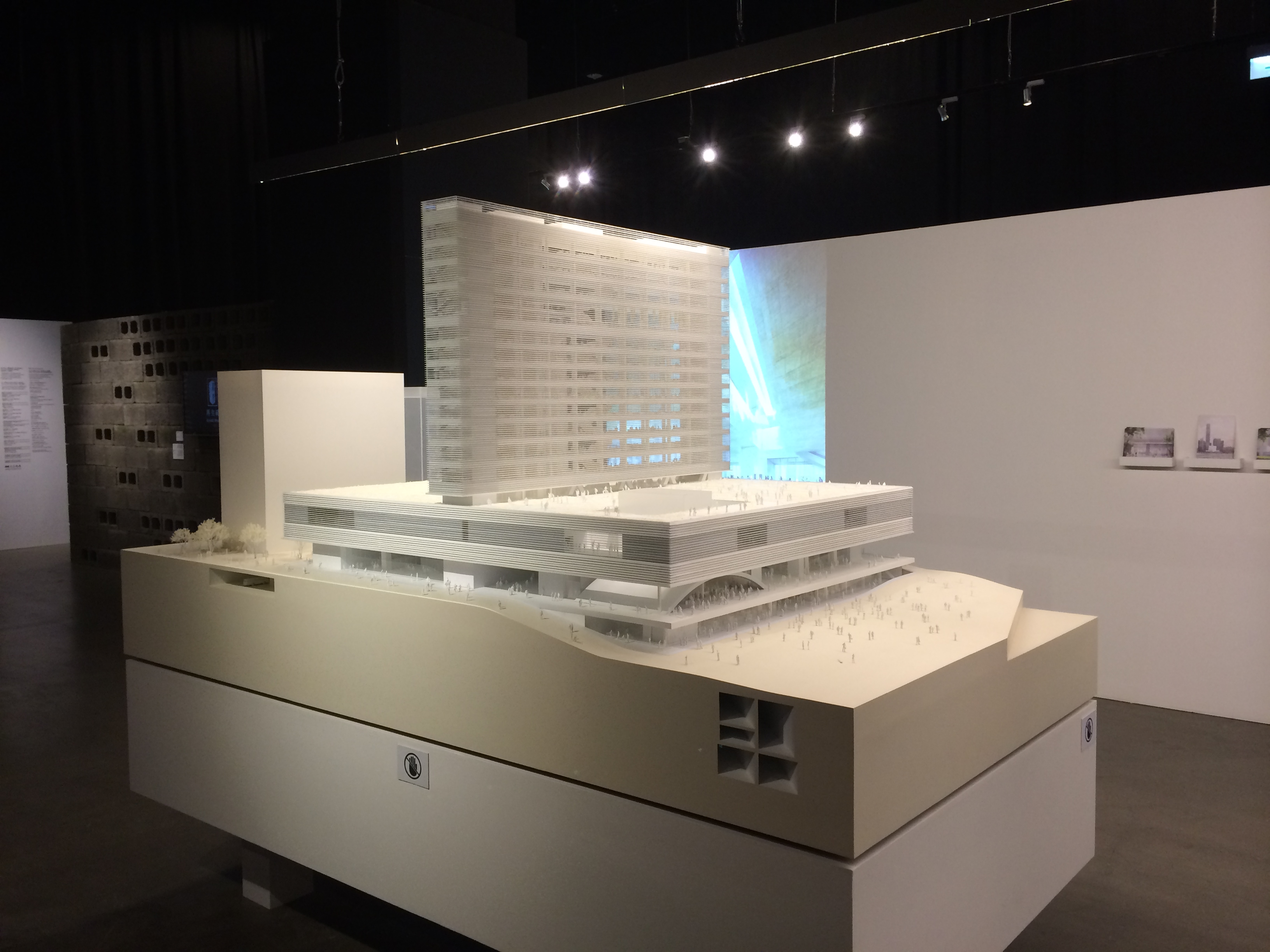 Museum+ Model